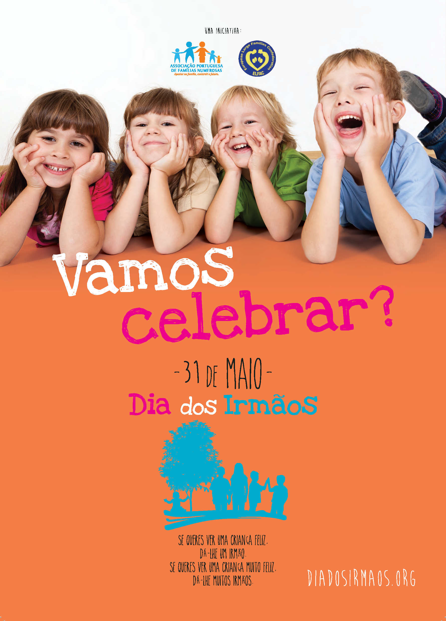 Cartaz comemorativo do Dia dos Irmãos em Portugal, no ano 2015.